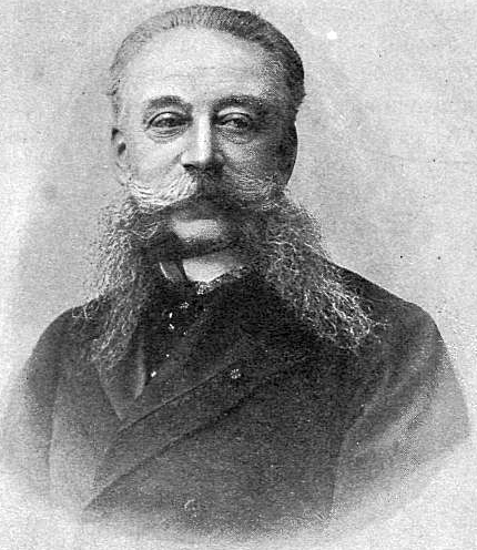 Иван Логинович Горемыкин